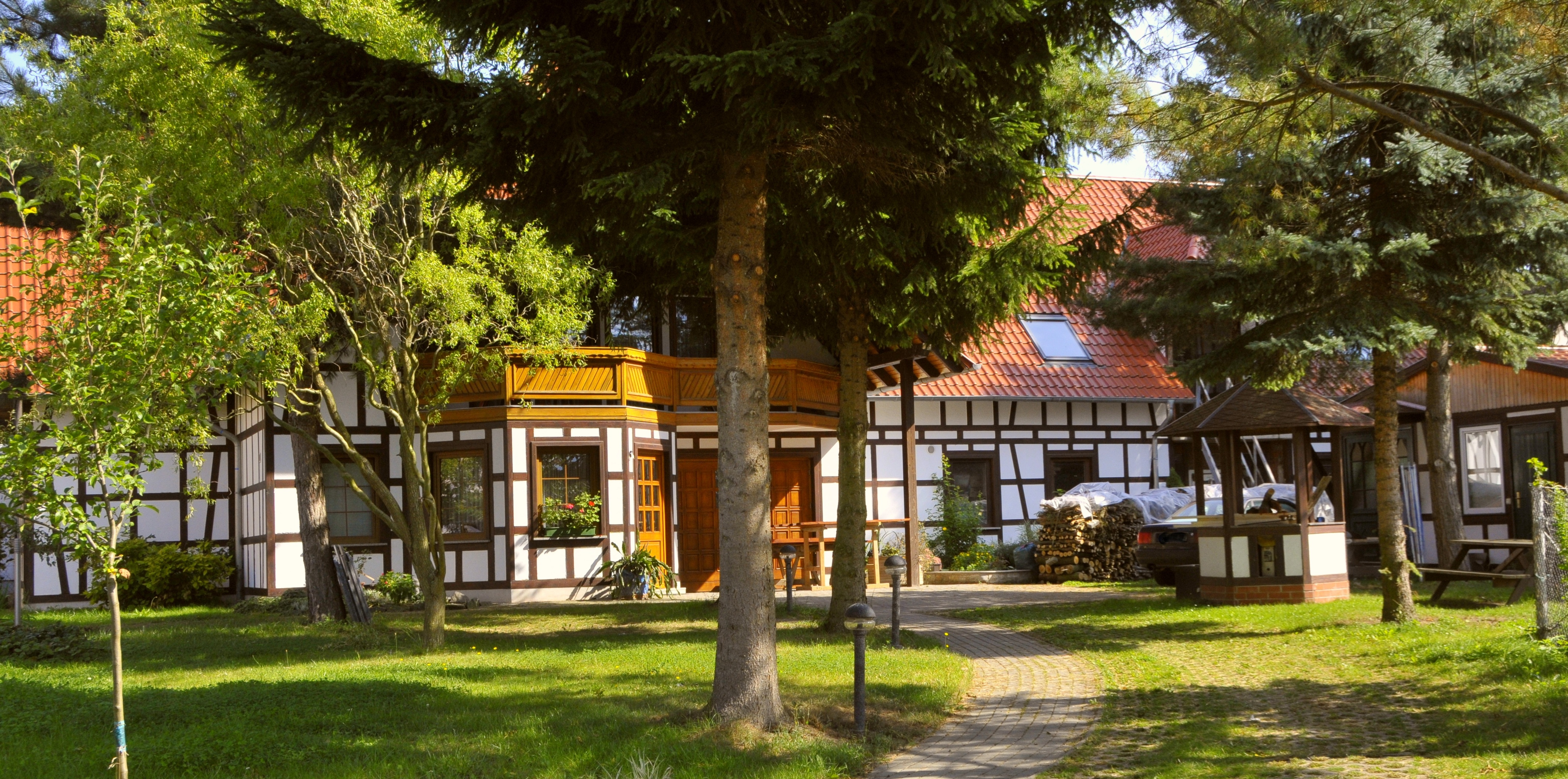 Tröchtelborn, Wohnhaus